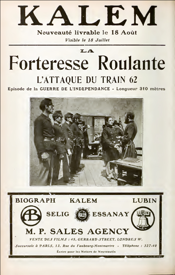 Publicité